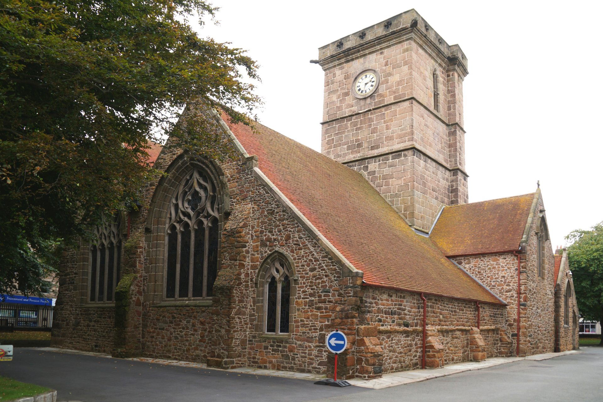 "The Parish Church of St Helier" - die Pfarrkirche der Inselhauptstadt - Island of Jersey Kanalinseln United Kingdom Foto 2017 Wolfgang Pehlemann DSC05074